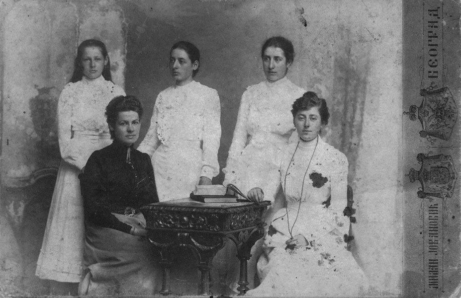 Сестре Надежде Петровић